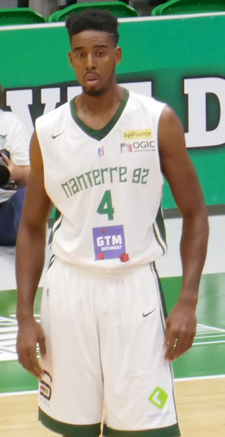 Alade Aminu avec le maillot de Nanterre 92